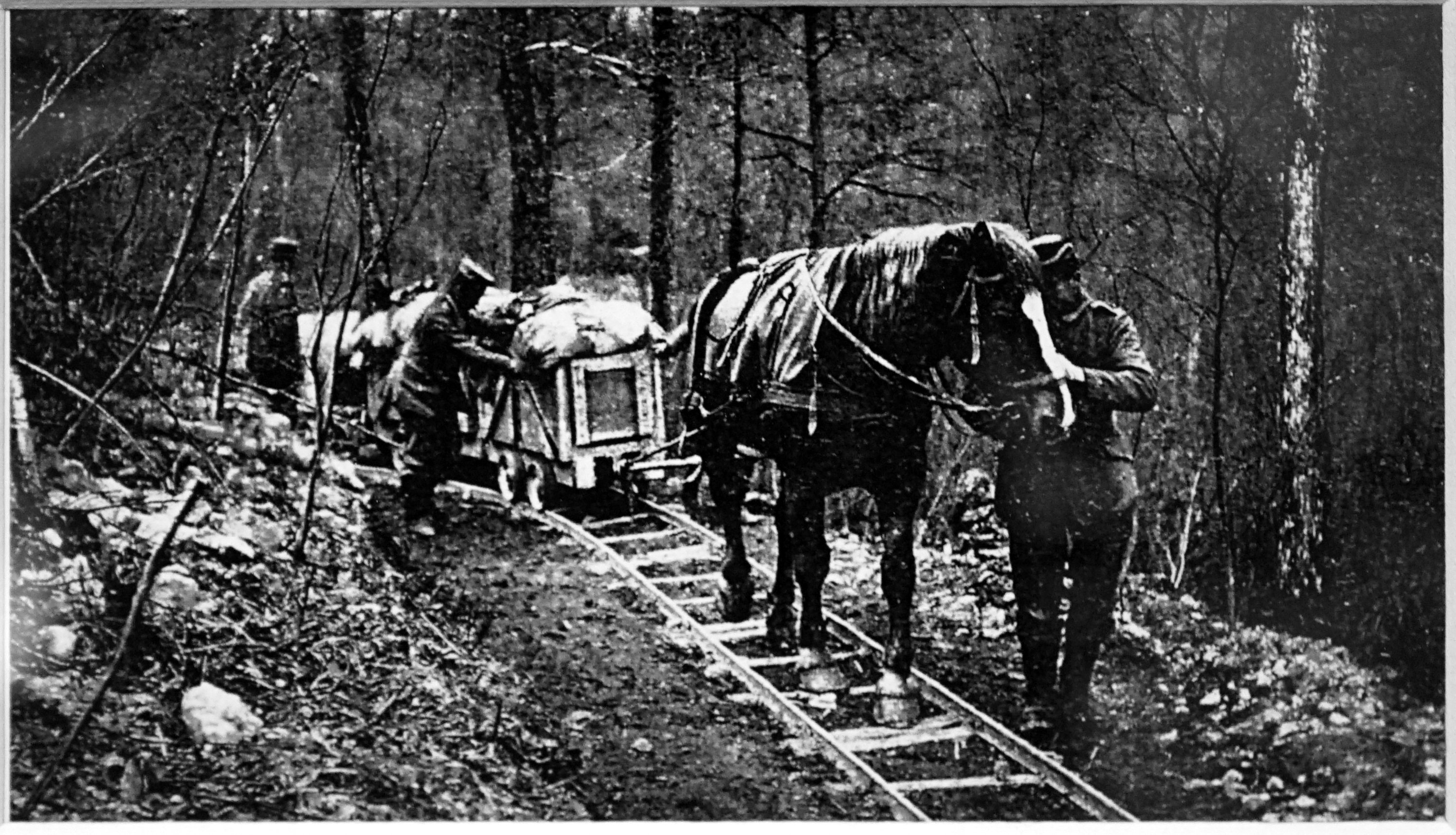 lors d'une exposition temporaire.